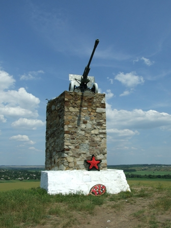 г. Черный Ворон, близ х. Подгорный, Матвеево-Курганский район